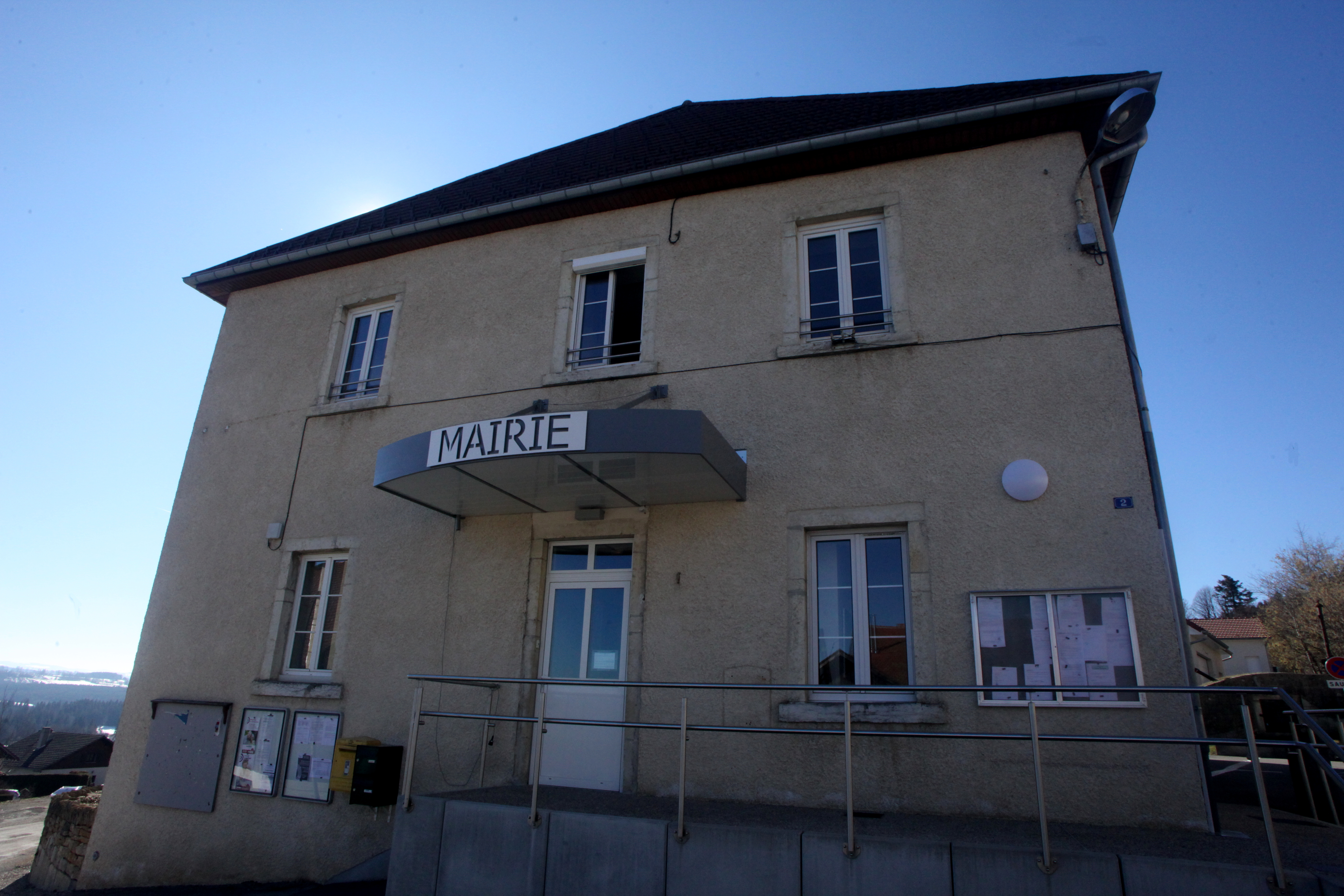 Mairie de Cernay-l'Église.